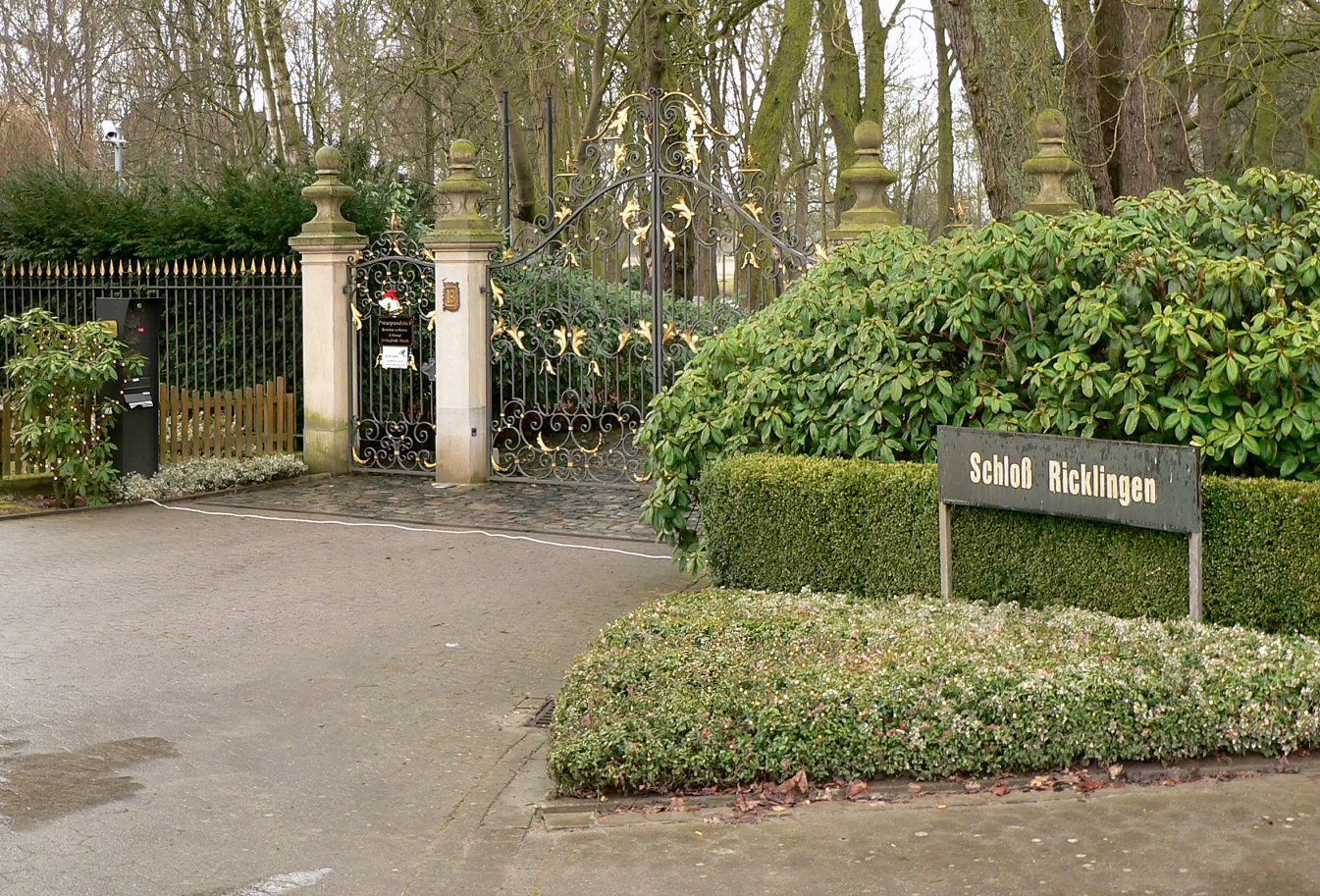 Eingangstor zum Schloss Ricklingen